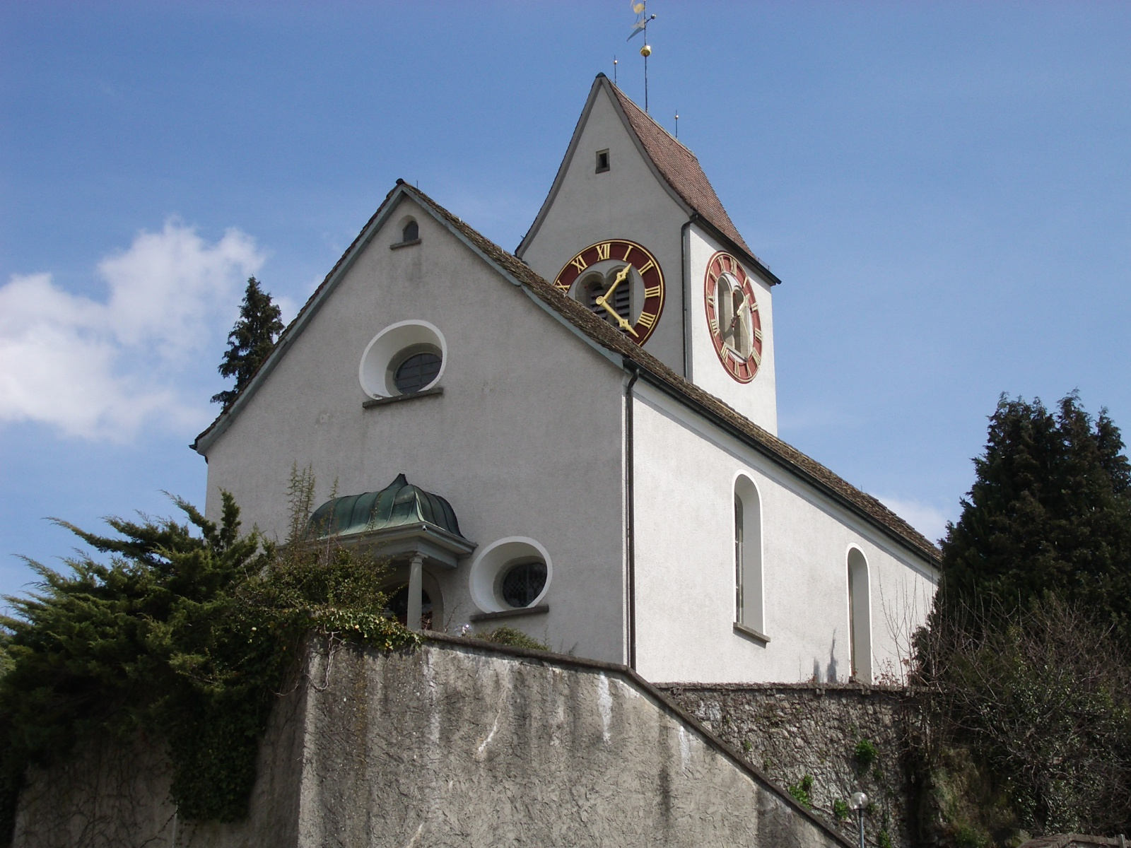 Weiningen ZH, Switzerland self-made, April 2006